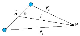 Schematizzazione di un dipolo elettrico. Categoria:Grafici di fisica